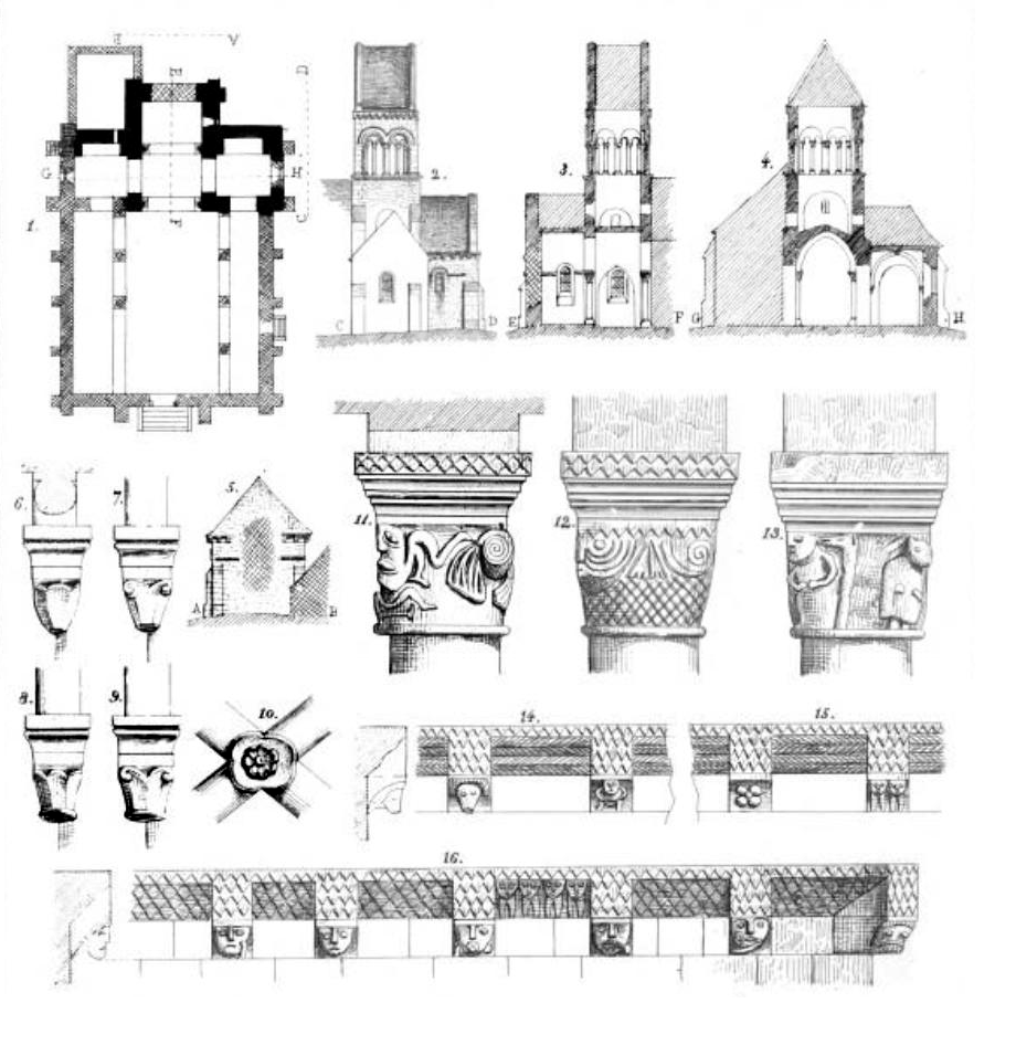 Relevés architecturaux par Eugène Woillez.